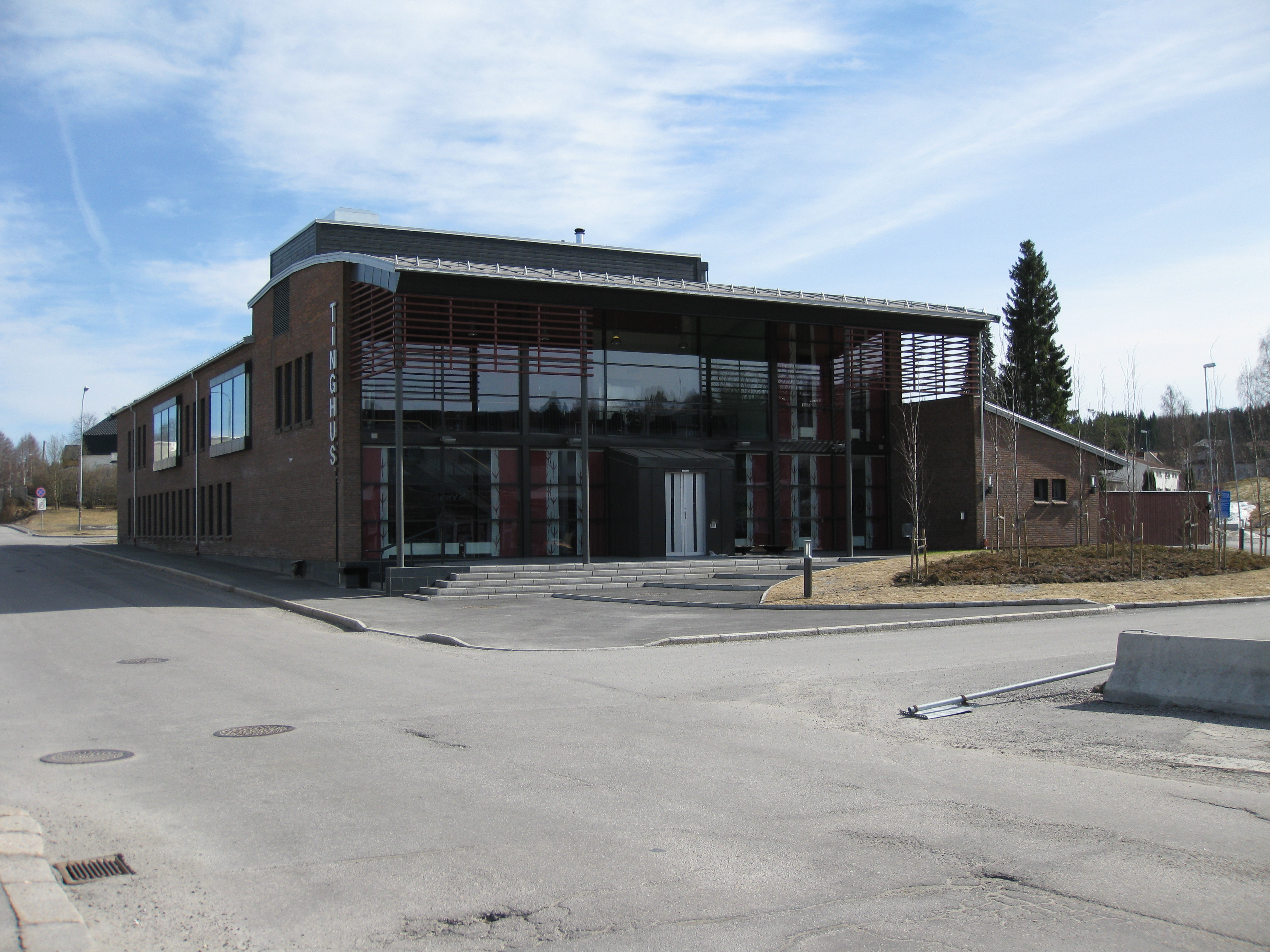 Tinghuset til Glåmdal tingrett. Tatt i bruk 1. april 2006.